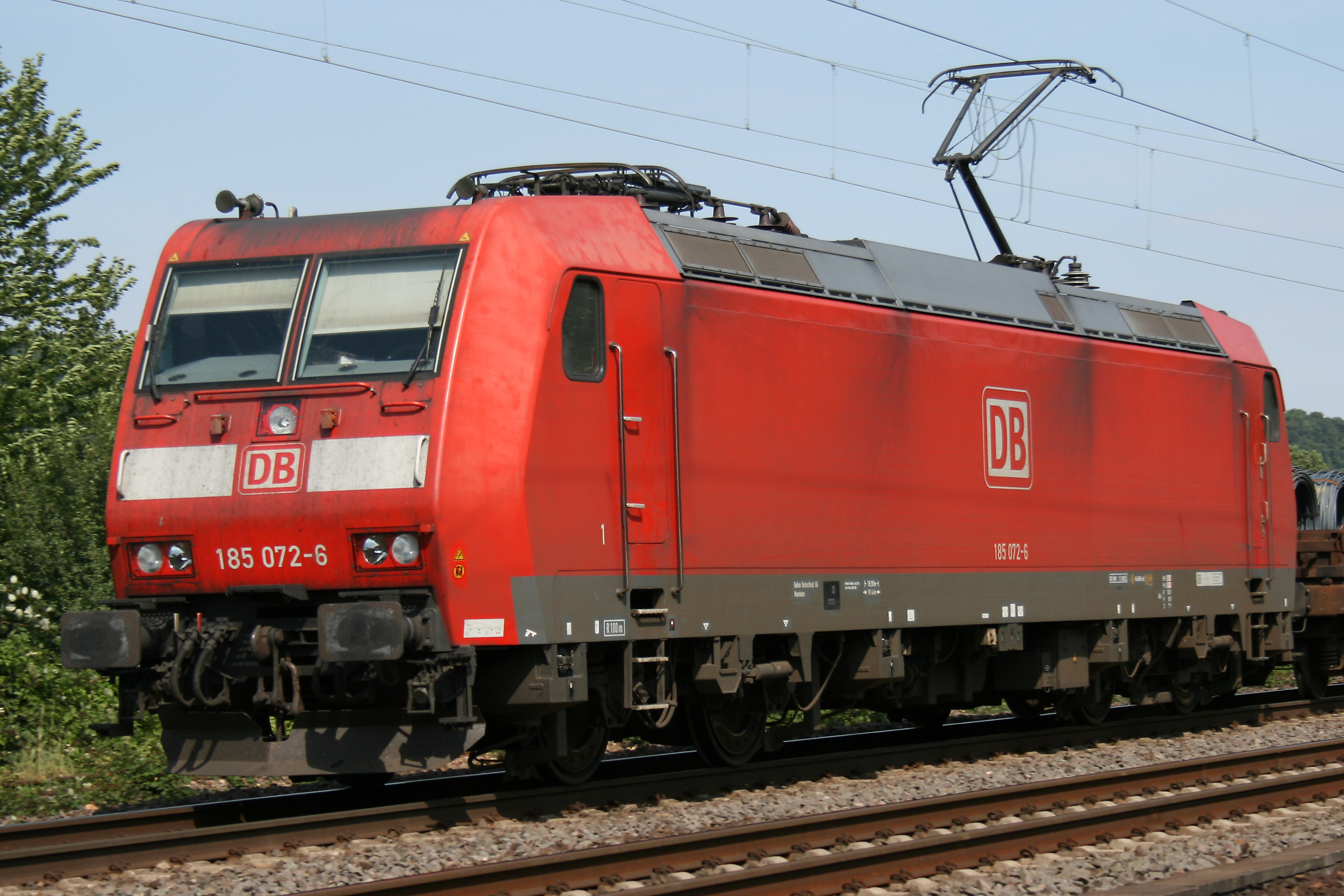 Die Lokomotive 185 072-7 der Baureihe 185 bei Unkel